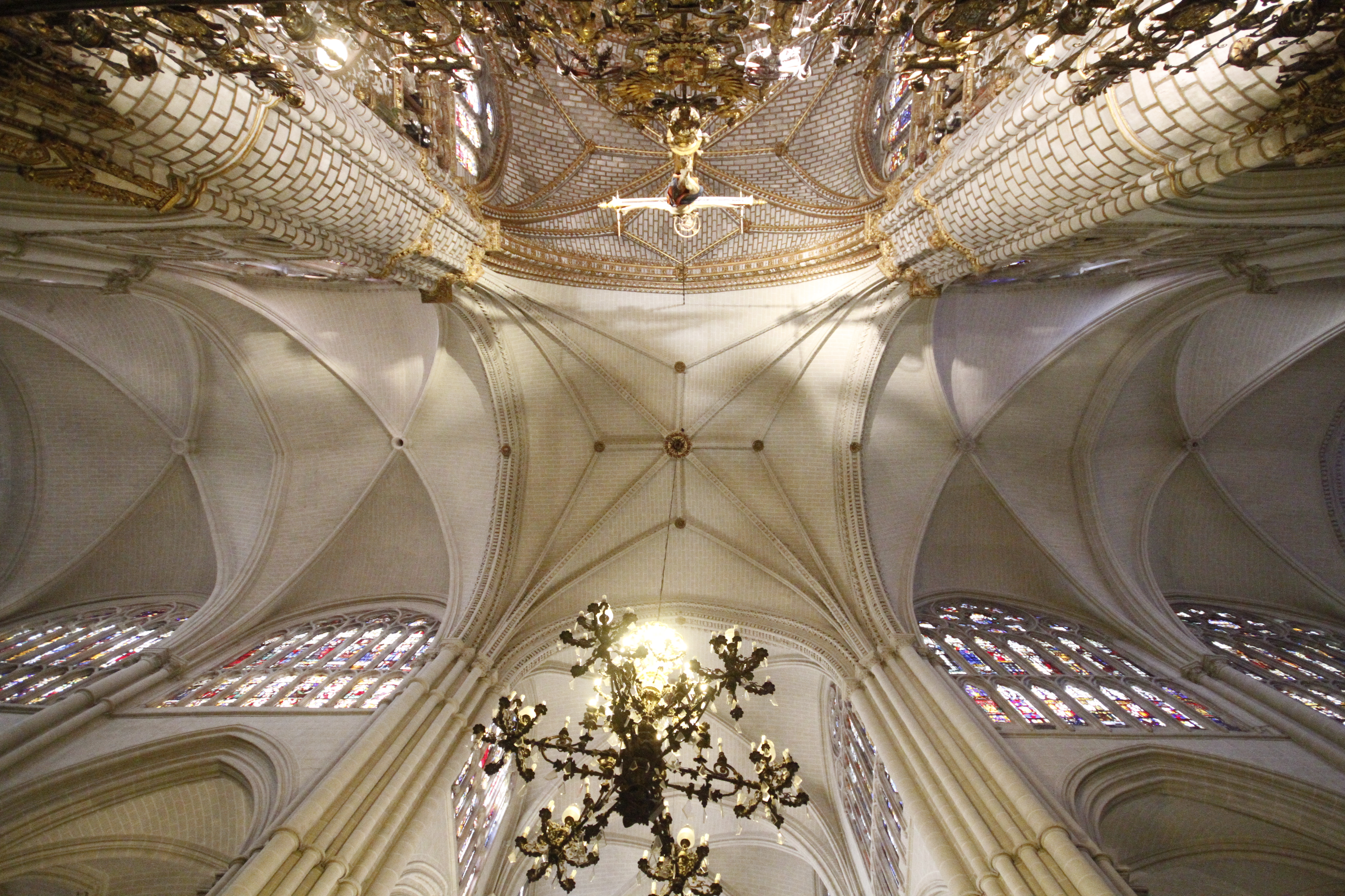 Teto da Catedral